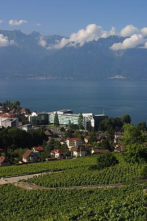 Blick auf den Hauptsitz der Nestlé in Vevey (Genfersee)